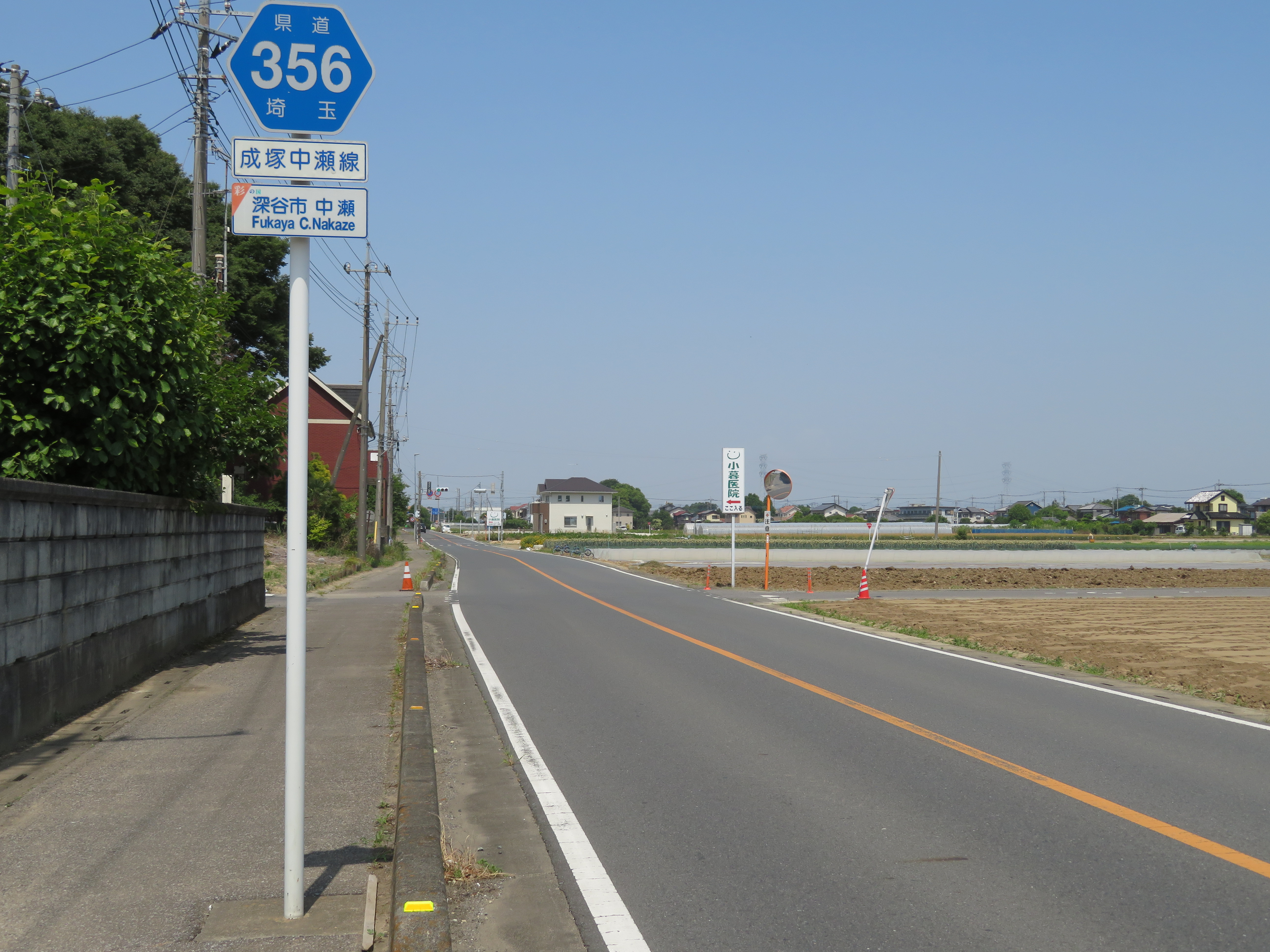 埼玉県道356号線深谷市中瀬付近（上武大橋方面を撮影） Canon PowerShot SX720 HS